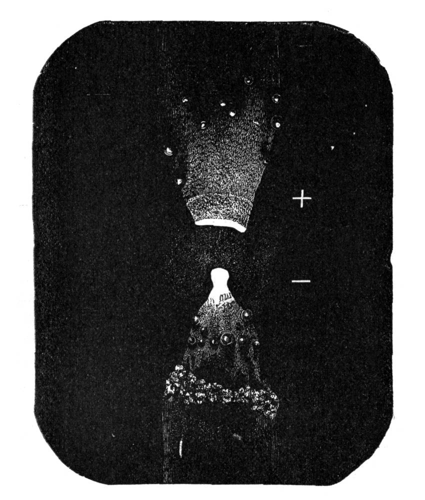 Die Kohlen einer Bogenlampe im Betrieb.